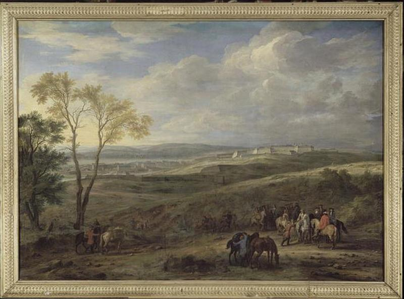 Prise de Charleroi - 12 juin 1667, montre le siège de Charleroi par les armées de Turenne pendant la guerre de Dévolution.